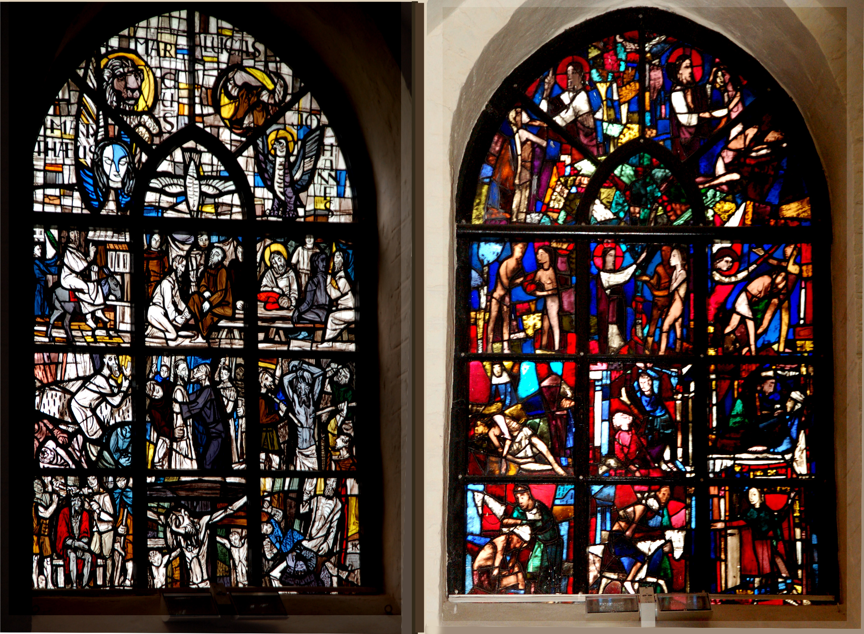 Windows St.Annen-Church Berlin-Dahlem